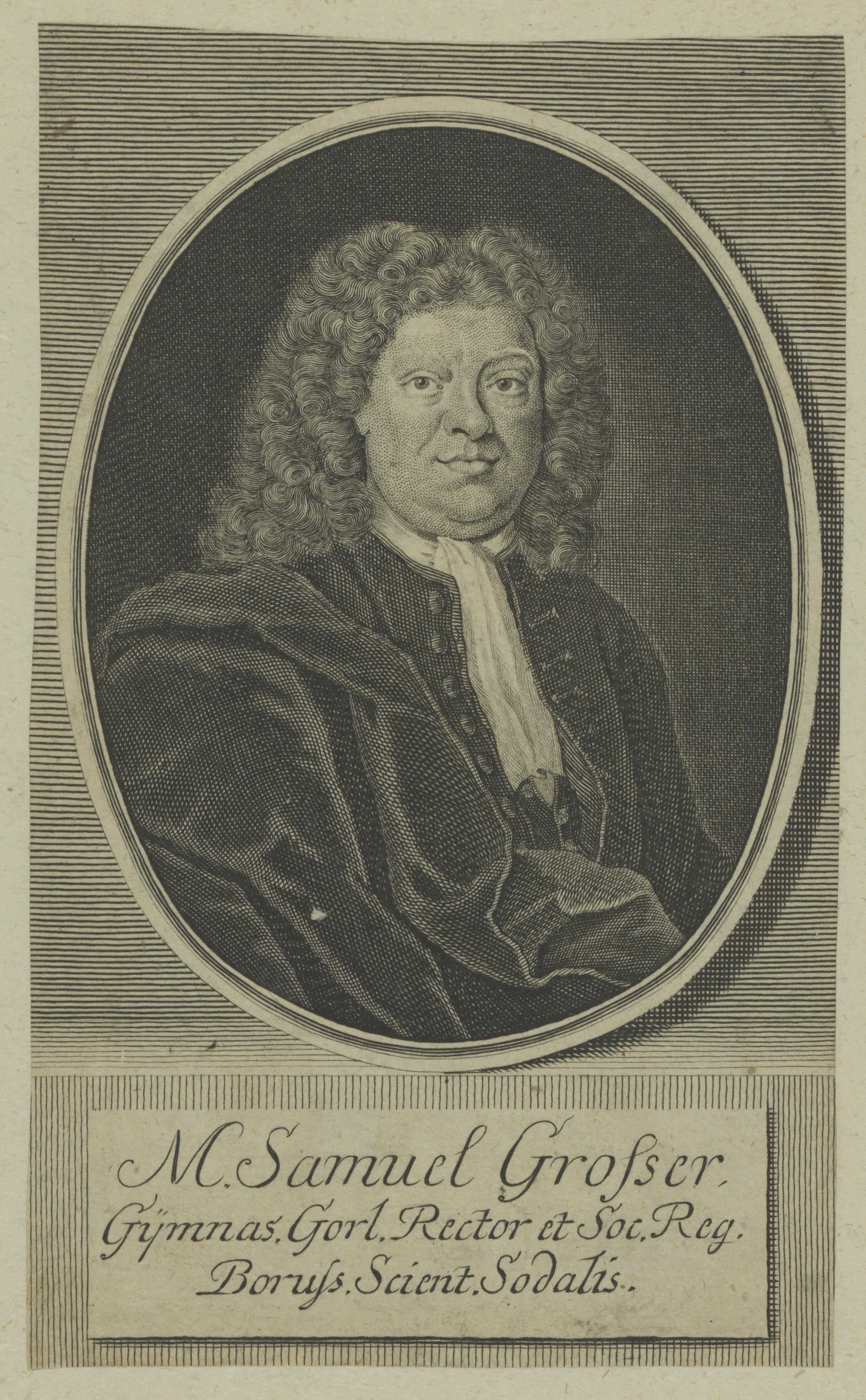 Bildnis des Samuel Grosser